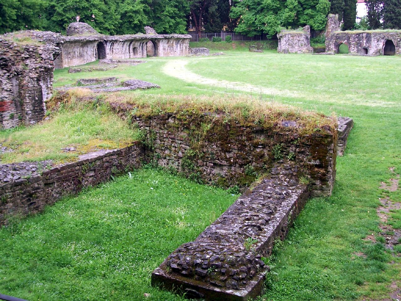 L'anfiteatro romano di Arezzo, Toscana, Italia.Amfiteatro3